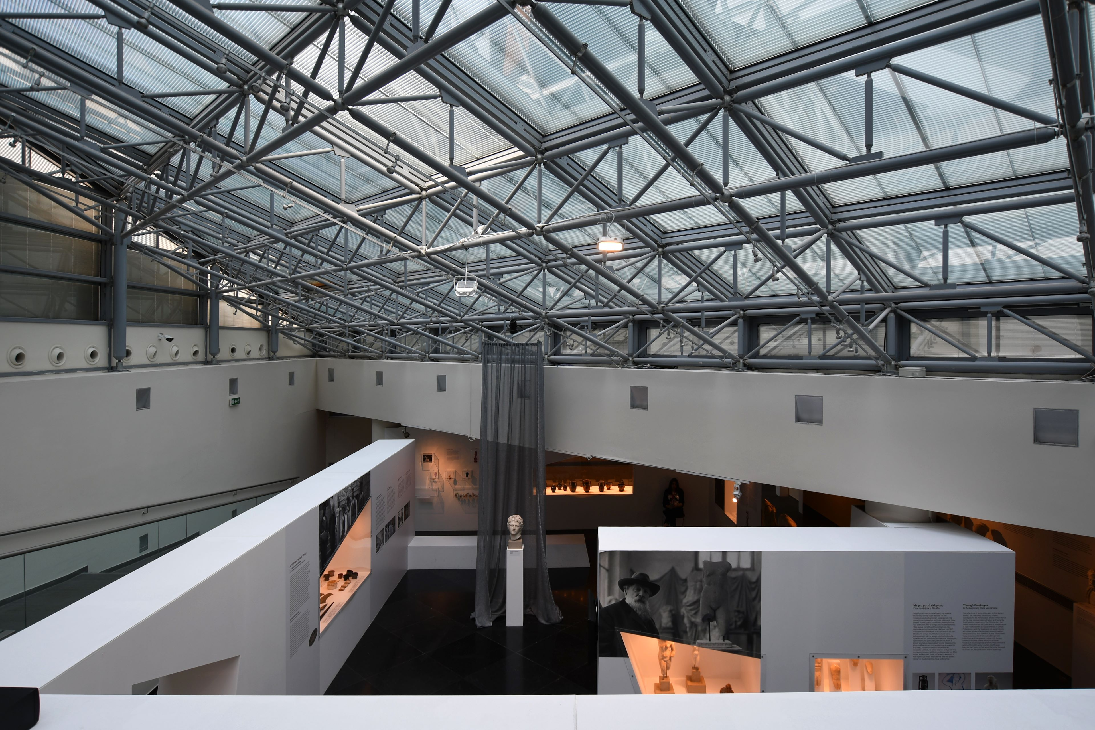 Archäologisches Museum Thessaloniki (Αρχαιολογικό Μουσείο Θεσσαλονίκης)